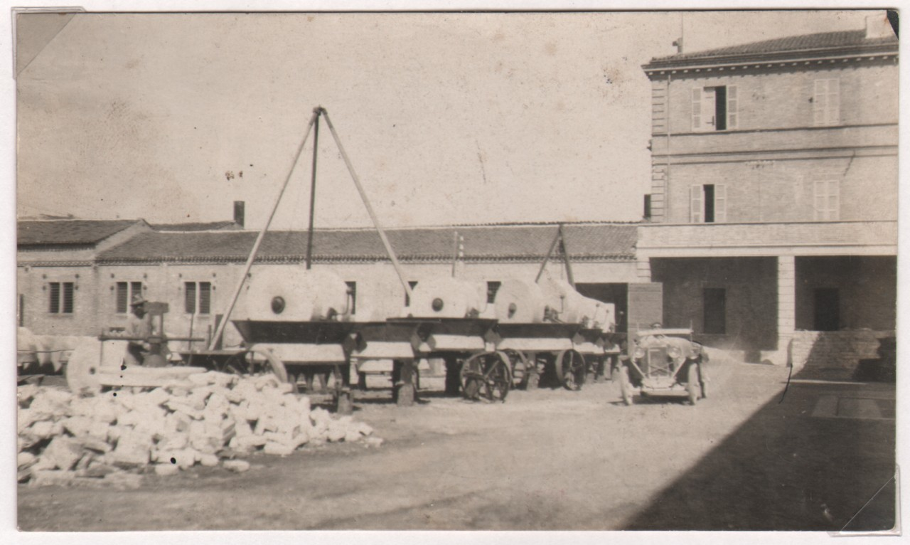 Immagine esterna della fonderia Camplone. Il complesso era composto da vari capannoni con diverse destinazioni, produceva macchine oleraie e vi si fondeva la ghisa e l'acciaio necessari alla fabbricazione di tombini, fontane e ancore. In primo piano le macine per il frantoio, Pescara 1926 (AS Pescara, Archivio privato D'Ascanio Corradino, b. 2, fasc. 41, n. 2)